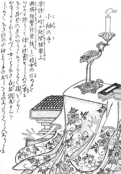 Kosodenote (小袖の手) from the Konjaku Hyakki Shūi (今昔百鬼拾遺)